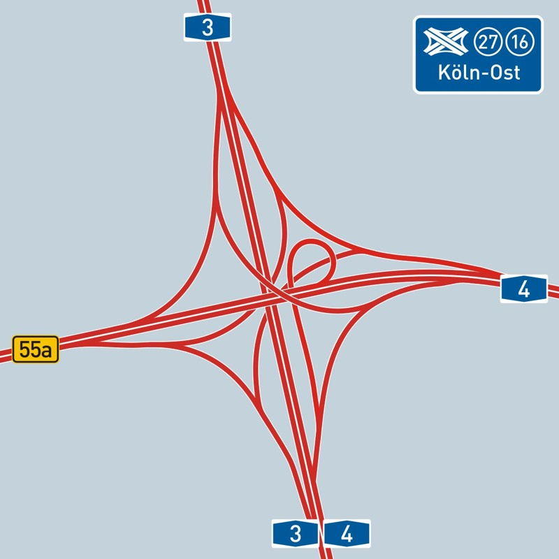 Schema Autobahnkreuz Köln-Ost